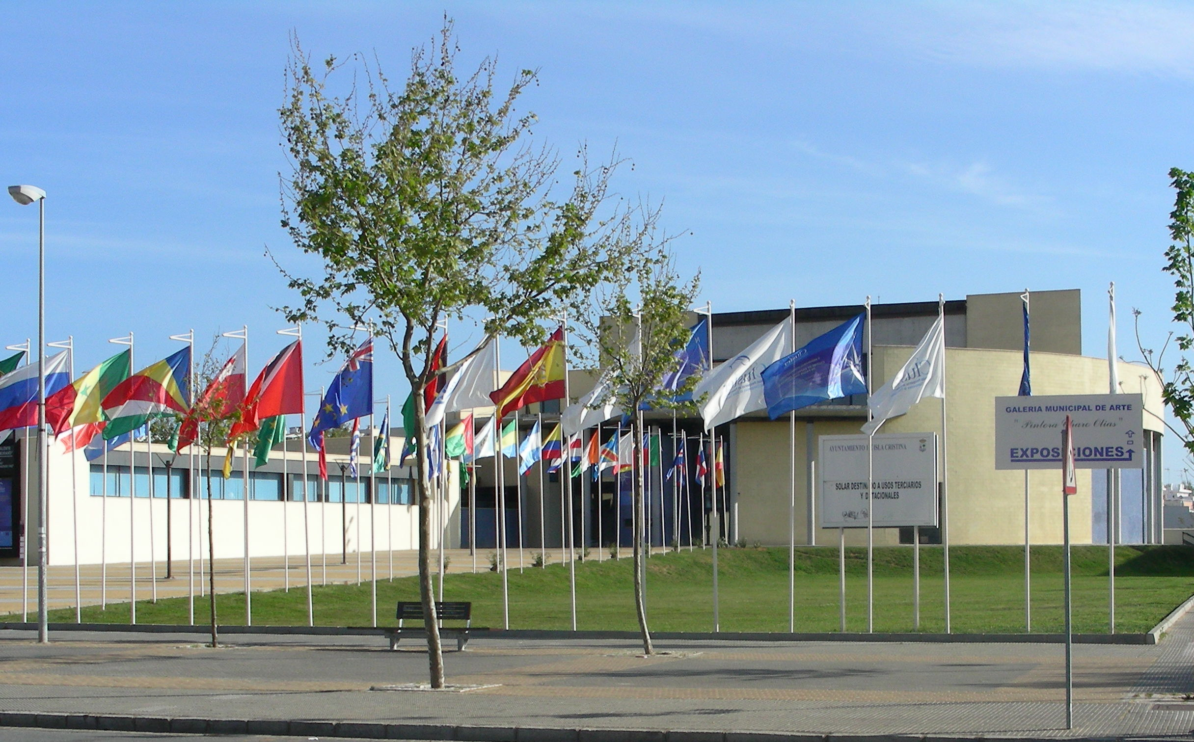 Centro Cultural Polivalente Juan Bautista Rubio Zamorano de Isla Cristina